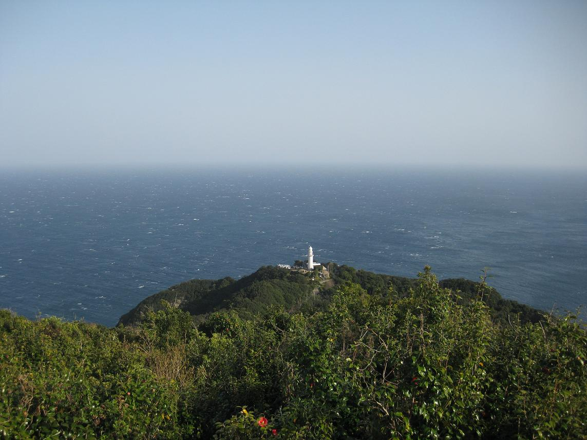 パノラマ展望ブリッジの絶景